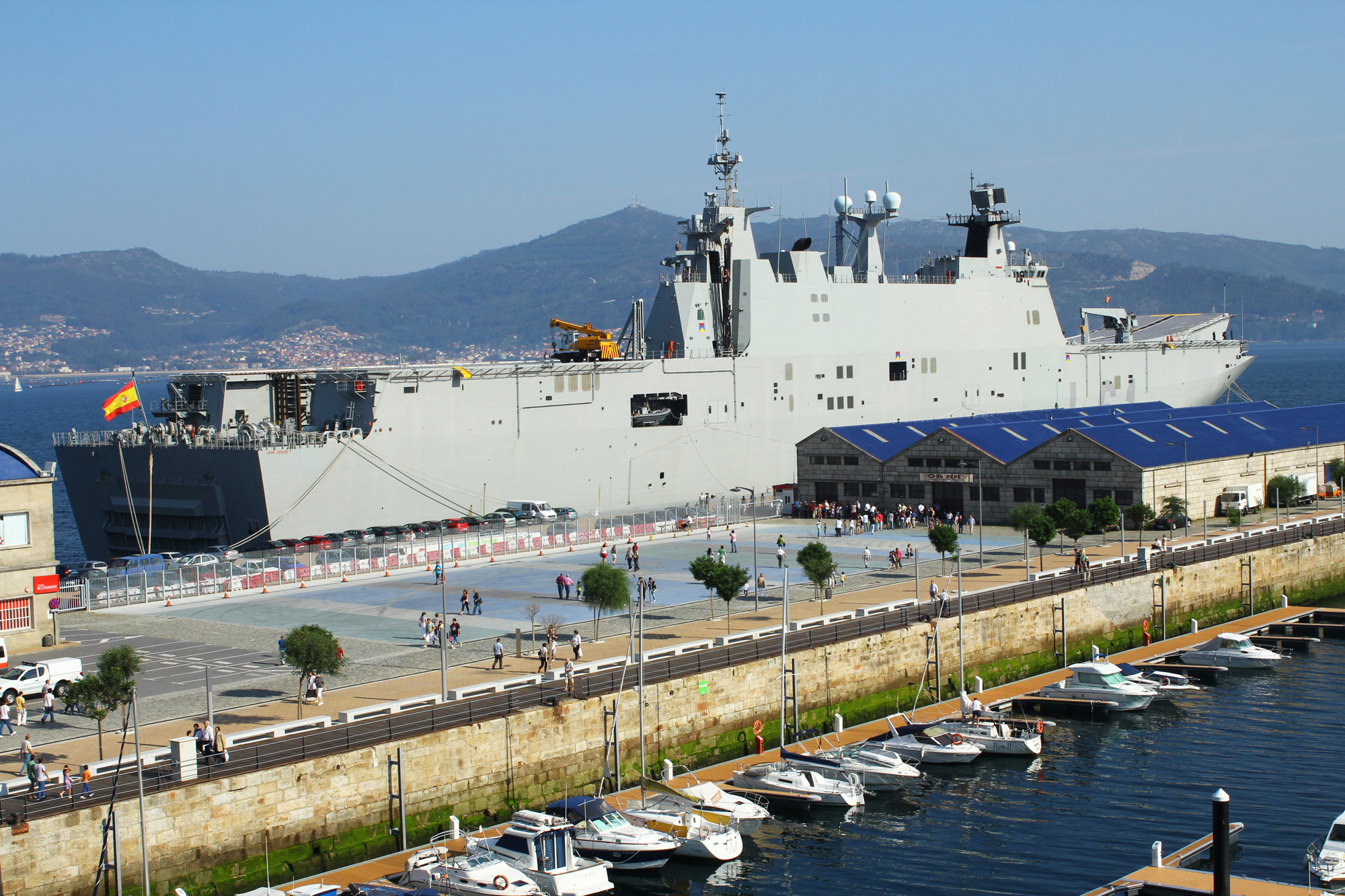 Buque de Proyección Estratégica "Juan Carlos I" de la Armada Española, amarrado en el muelle de transatlánticos de Vigo. Este barco es una mezcla de portaaviones y buque de desembarco: puede lanzar aviones, helicópteros y lanchas con tanques, blindados y todo tipo de vehículos desde un muelle inundable situado en la popa. The L-61 "Juan Carlos I" in Vigo Strategic Projection Ship "Juan Carlos I" of the Spanish Navy, moored at the liners dock in Vigo. This boat is a mix of aircraft carrier and landing ship, it can launch planes, helicopters and boats with tanks, armored vehicles and all kind of vehicles from a flooded dock located at the stern.